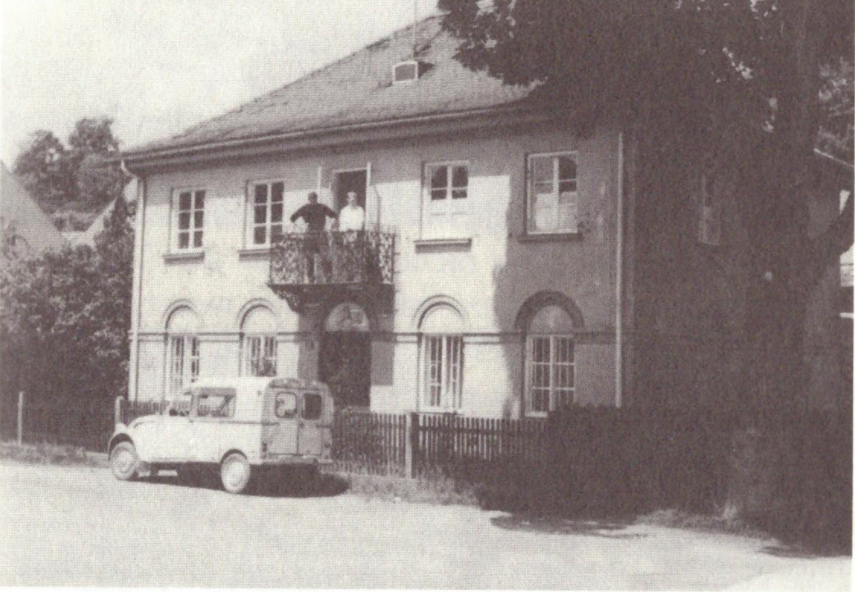 Das alte Haus Donariae vor Abriss